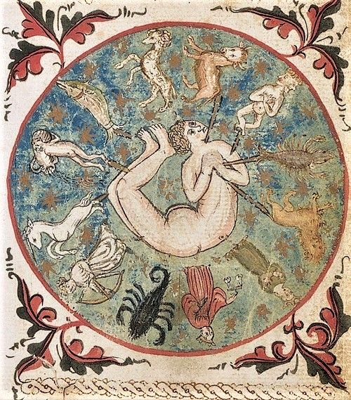 Raffigurazione dell'Uomo Zodiacale (dal portolano di Michele da Rodi, 1401)